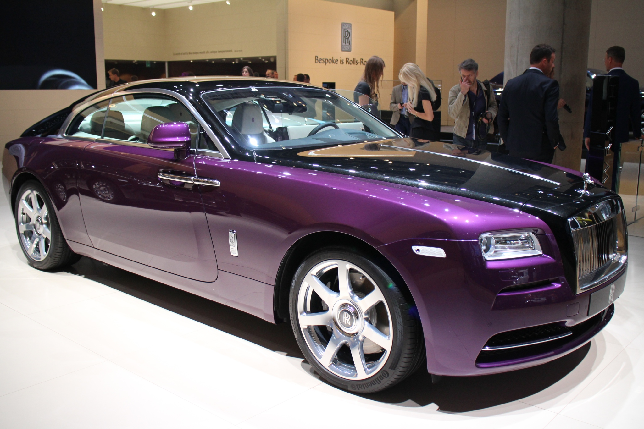 IAA 2013